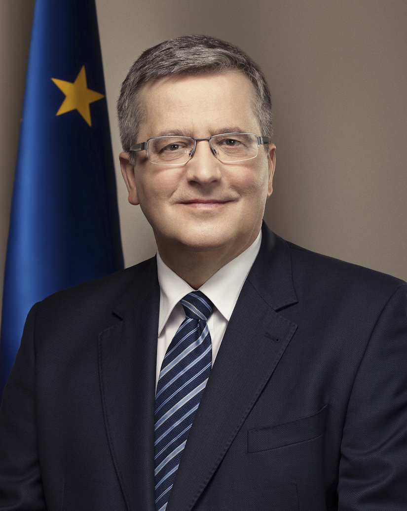 31/01/2013 Warszawa Oficjalne Portrety Prezydenta Bronislawa Komorowskiego. Fot. Wojciech Grzedzinski/KPRP